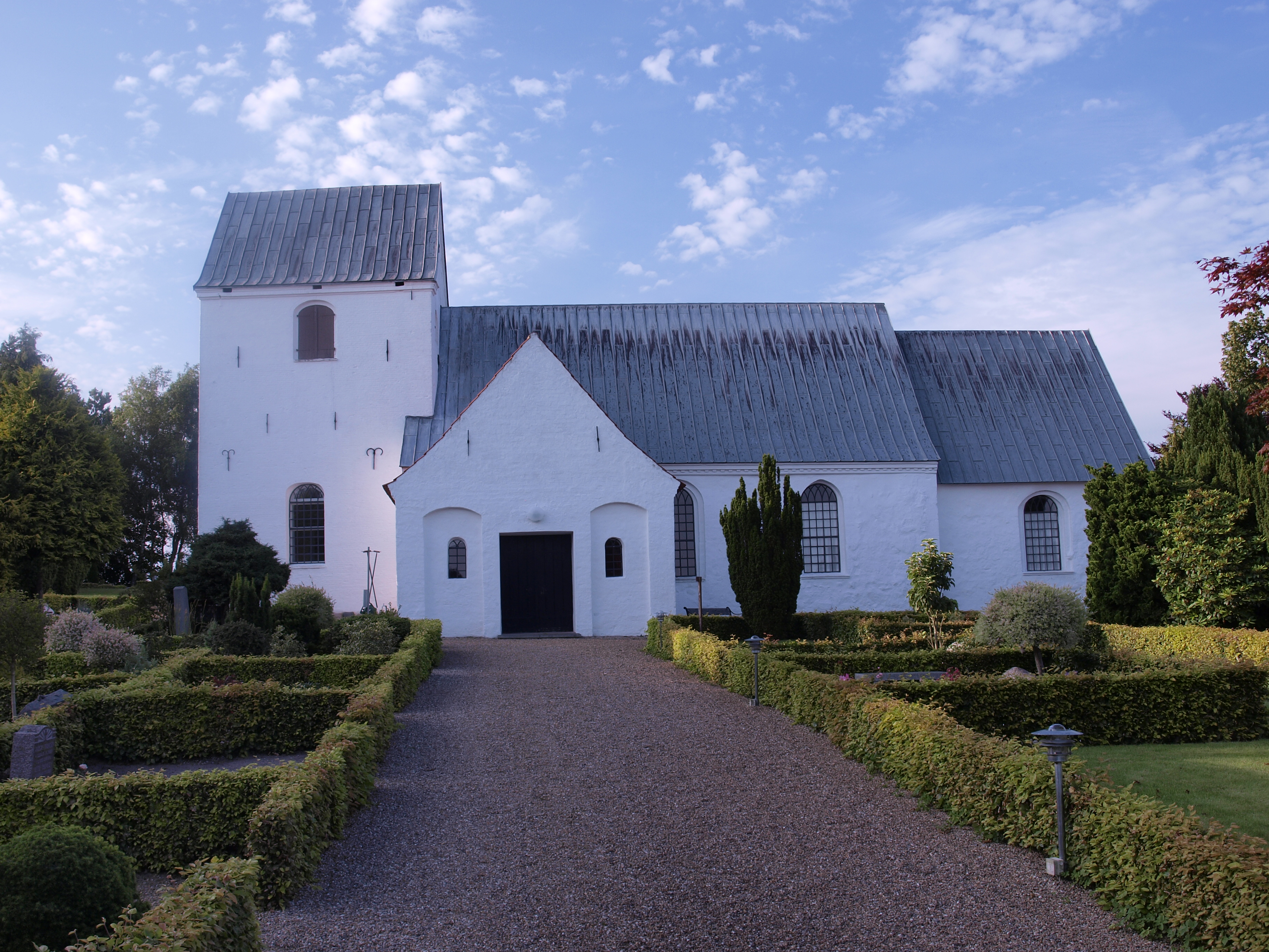 Eltang kirke fra syd